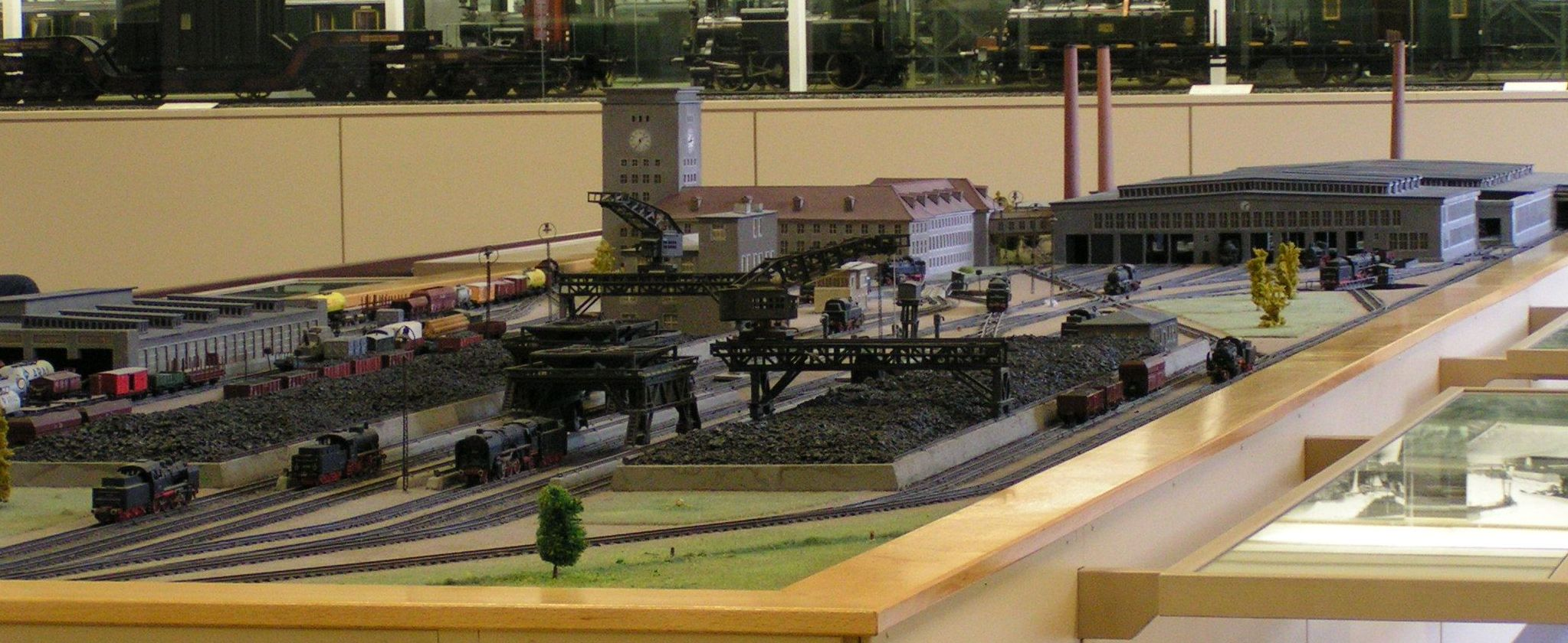 Modell eines geplanten Dampflok-Betriebswerks der Deutschen Reichsbahn, im DB-Museum Nürnberg